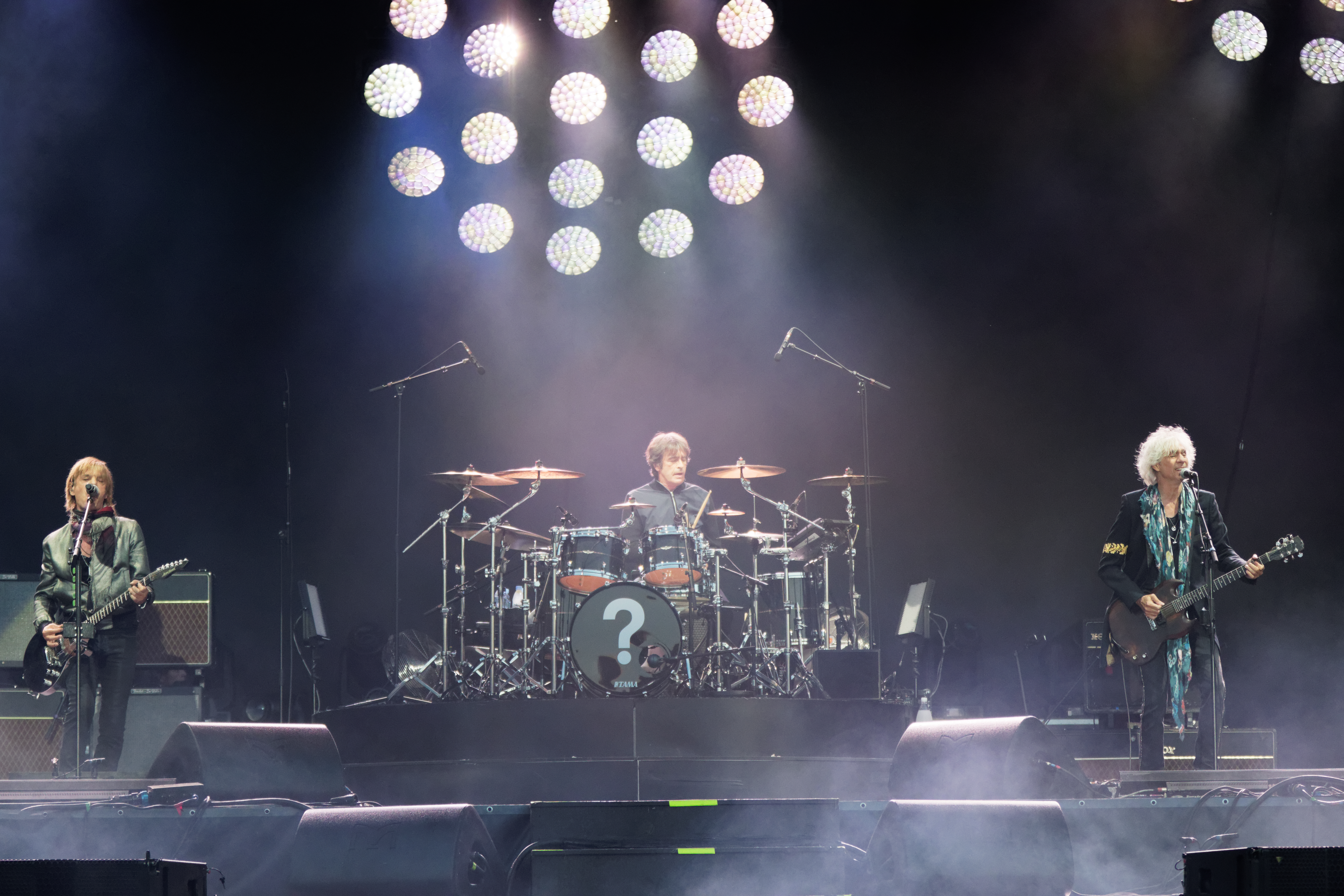 Les Insus en concert lors du festival des vieilles charrues 2016.